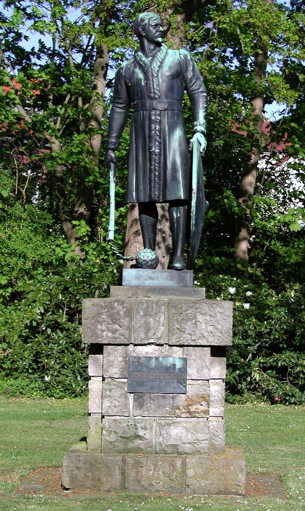 Denkmal "Hartwarder Friese" in Rodenkirchen (Gemeinde Stadland). Zum Andenken an die Schlacht bei der Hartwarder Landwehr 1514. Errichtet vom Rüstringer Heimatbund 1914. Bildhauer: Emil Jungbluth